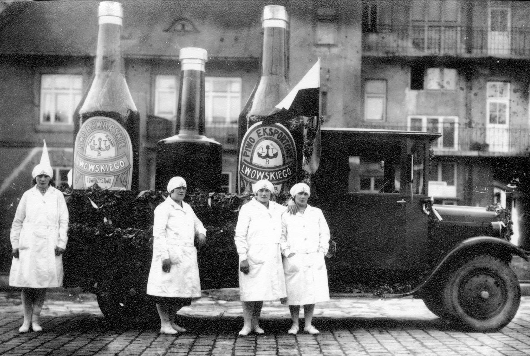 Uliczną reklamę piwa Lwowskiego, zainstalowaną na samochodzie, prezentowano z okazji Targów Wschodnich. Ta wielka międzynarodowa wystawa-jarmark odbywała się we Lwowie od 1921 roku na terenie dawnej Powszechnej Wystawy Krajowej (1894 r.), w górnej części Parku Stryjskiego. Tego typu reklamy, jak przejazdy ulicami miasta pracowników firmy z próbkami produkcji, wykorzystywały również firmy cukiernicze Höflingera i "Branka", Akcyjne Przedsiębiorstwo Browarów, fabryka konserw Ruckera i inne.